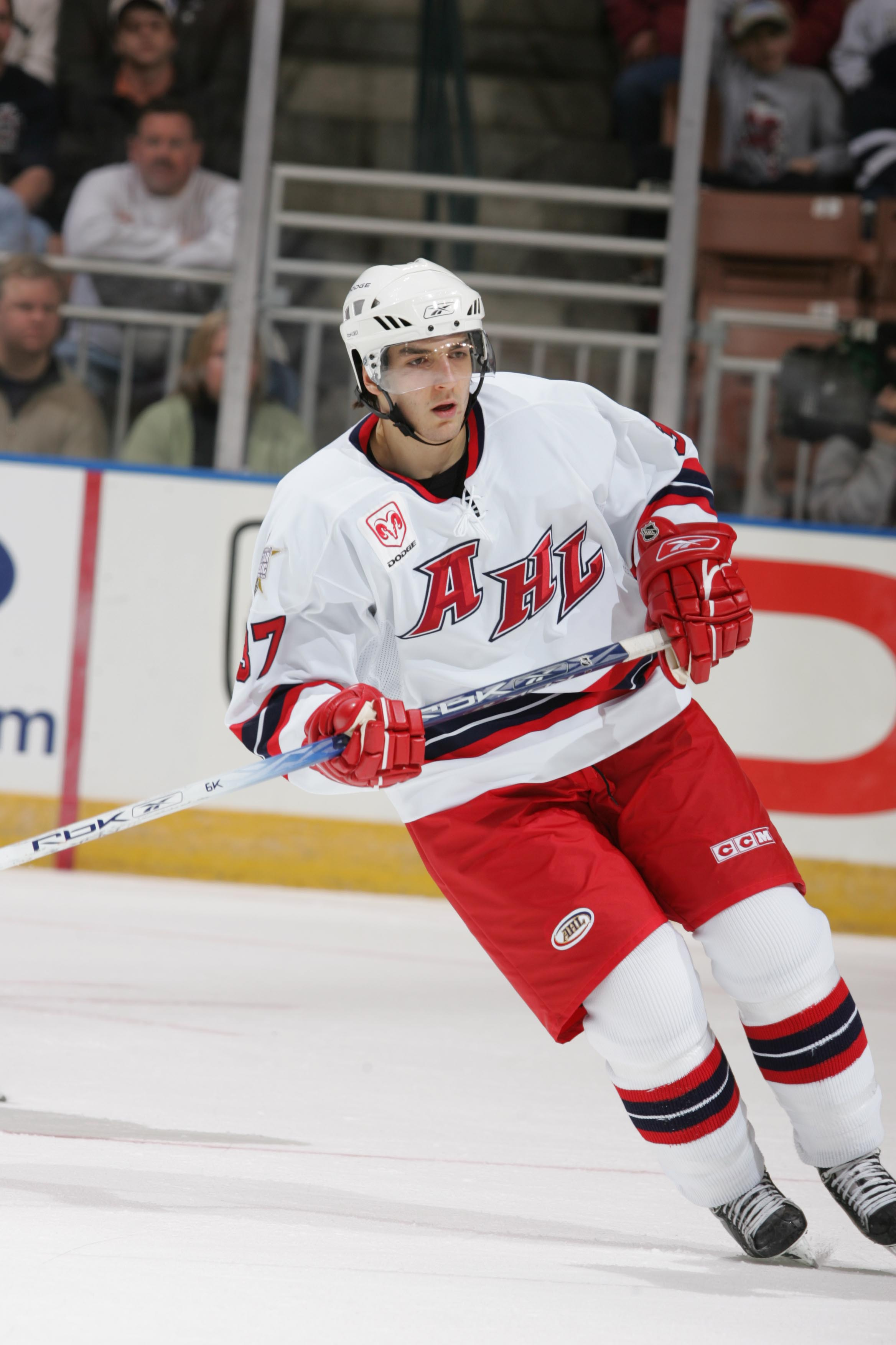 Photo: Jim McIsaac/AHL